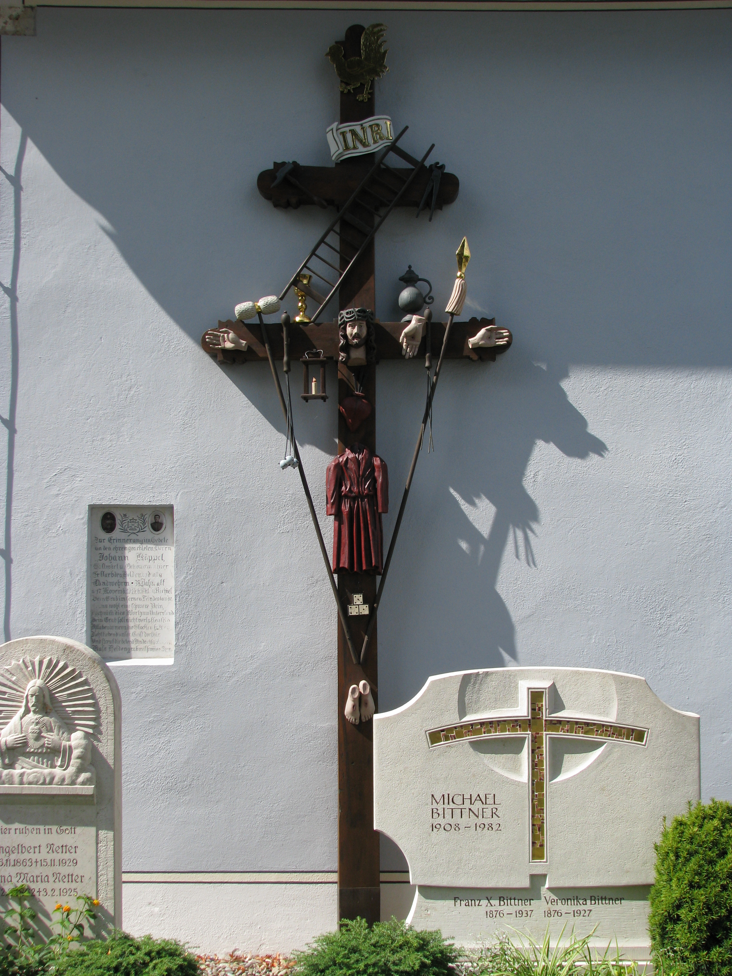 Linden, Ortsteil von Greding im mittelfränkischen Landkreis Roth in Bayern, Arma Christi-Kreuz an der Wallfahrtskirche